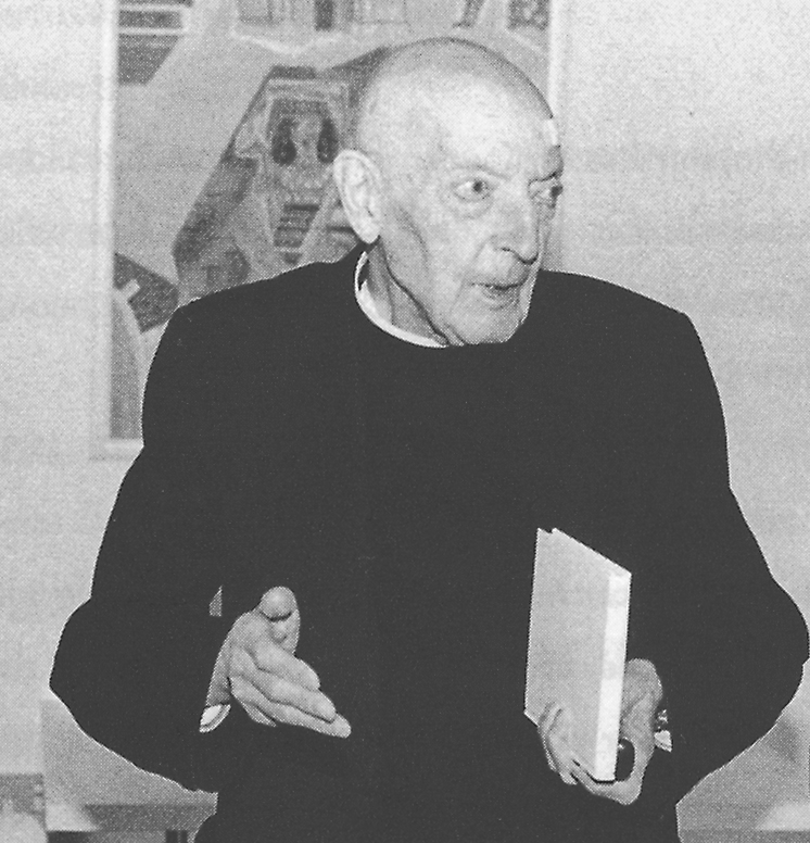 Pater Oswald von Nell-Breuning mit Prof. Heiner Ludwig (links) und Karl Nothof, Vorsitzender der KAB